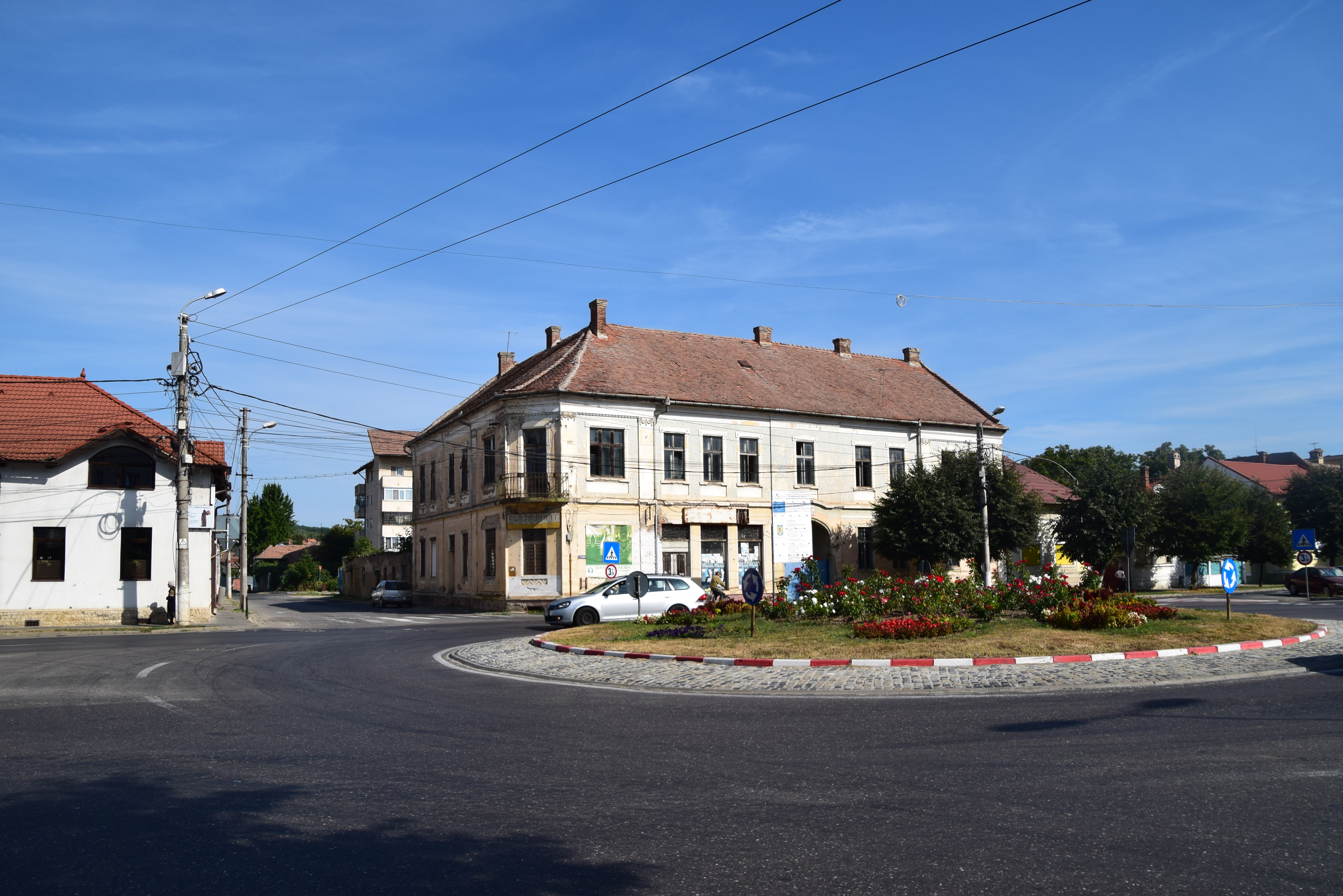 Casă, Str. Doamna Stanca 44, Făgăraș